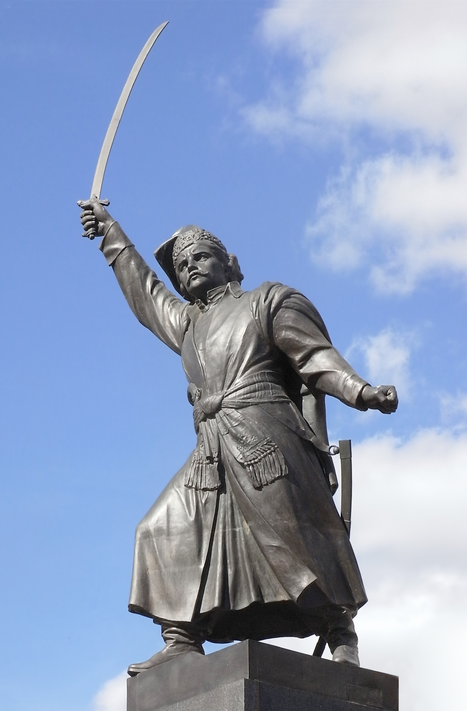 Jan-Kiliński-Denkmal in Warschau, ul. Podwale.